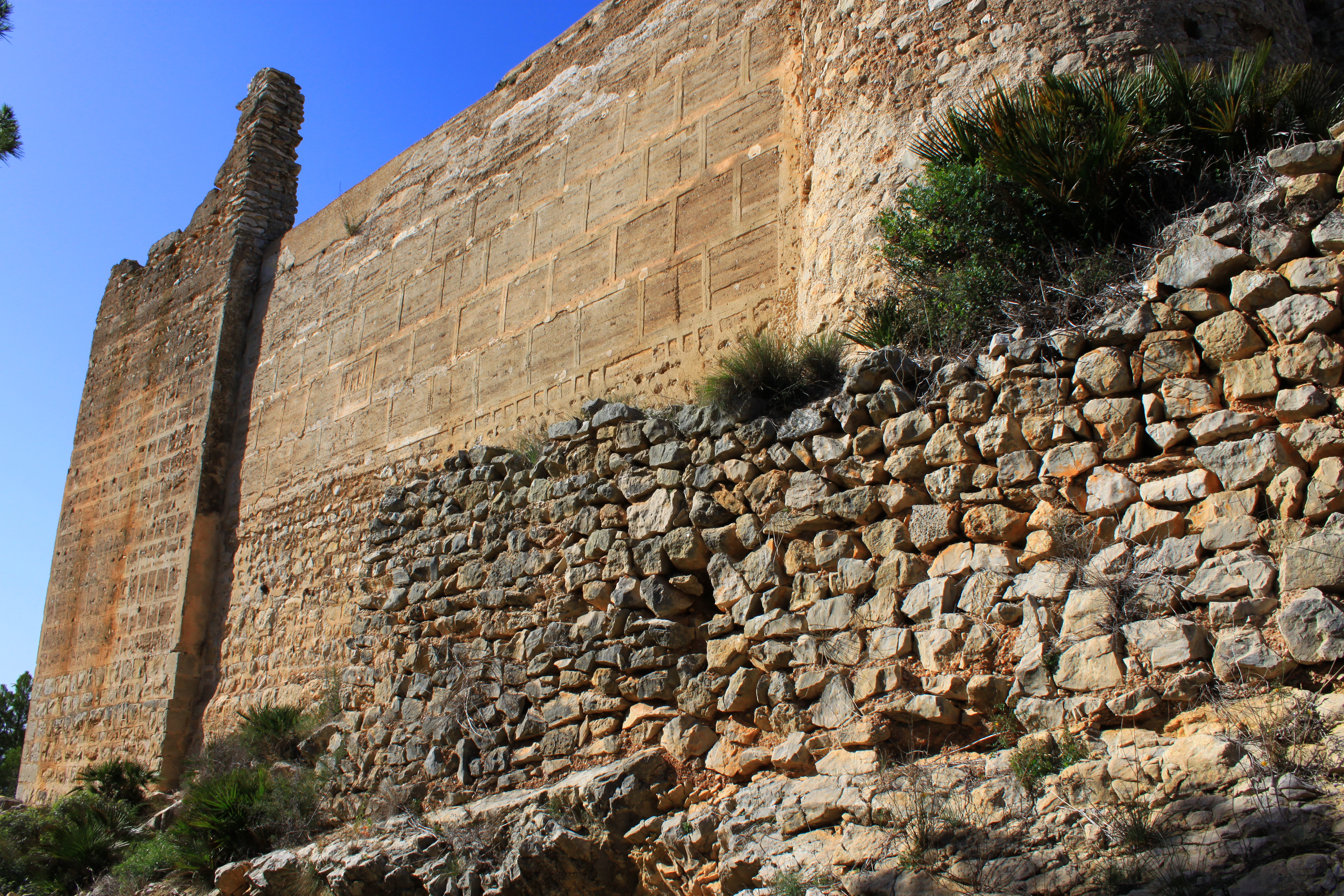 Castillo de Xivert. A la izquierda aparece en muro de Levante, junto a él el muro de Alafía que cierra por el sudeste la muralla del albacar. Se aprecian en este tramo de muralla al menos tres momentos constructivos diferentes. En la zona inferior se encuentra el basamento de mampostería con mortero, de escasa altura y sobre geológico que no se aprecia en la imagen. La zona media de la muralla está realizada mediante mampuestos encajonados. La zona superior está realizada con tapial calicostrado y presenta decoración simulando sillería. Aparece en el muro una inscripción en árabe realizada en estuco y en relieve que dice el que concede la victoria es Dios (al-fatih Allah). Alcalá de Xivert, provincia de Castellón, Comunidad Valenciana, España.